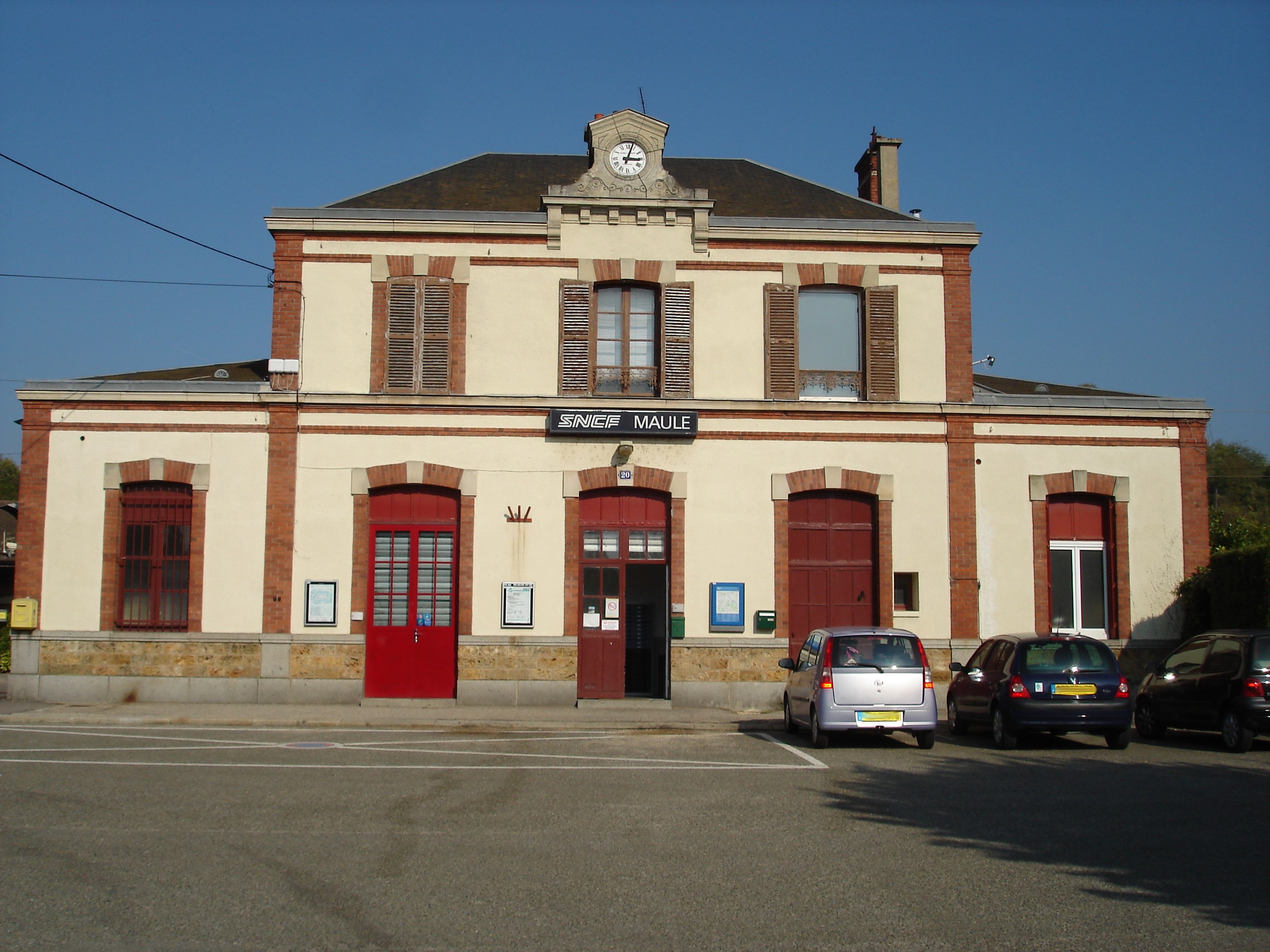 Gare de Maule (78) : Le bâtiment voyageurs.